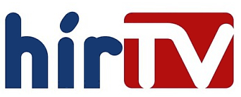 A Hír TV logója 2015 szeptemberétől